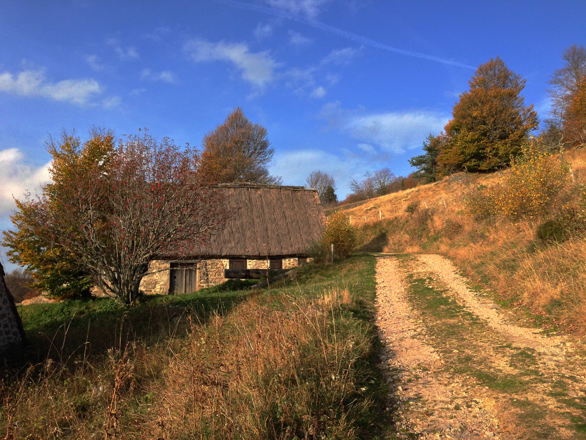 Les burons sont les habitats traditionnels des paysans d'autrefois.